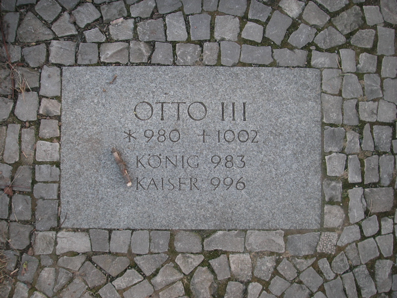 Der Weg der Ottonen: Otto III Fotografiert am Magdeburger Domplatz.